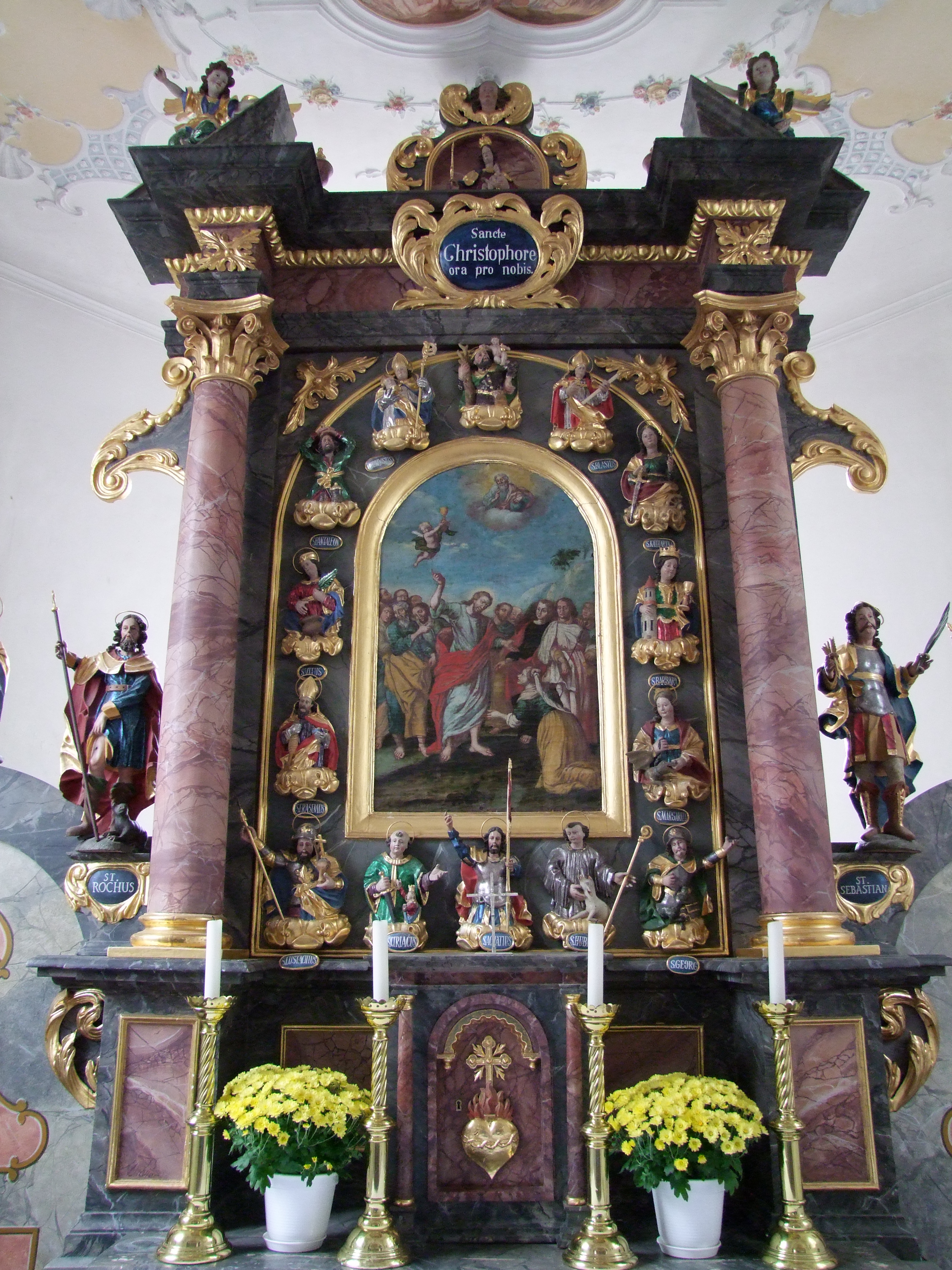 St. Christophorus im oberschwäbischen Frankenhofen bei Bad Wörishofen in Bayerisch/Schwaben